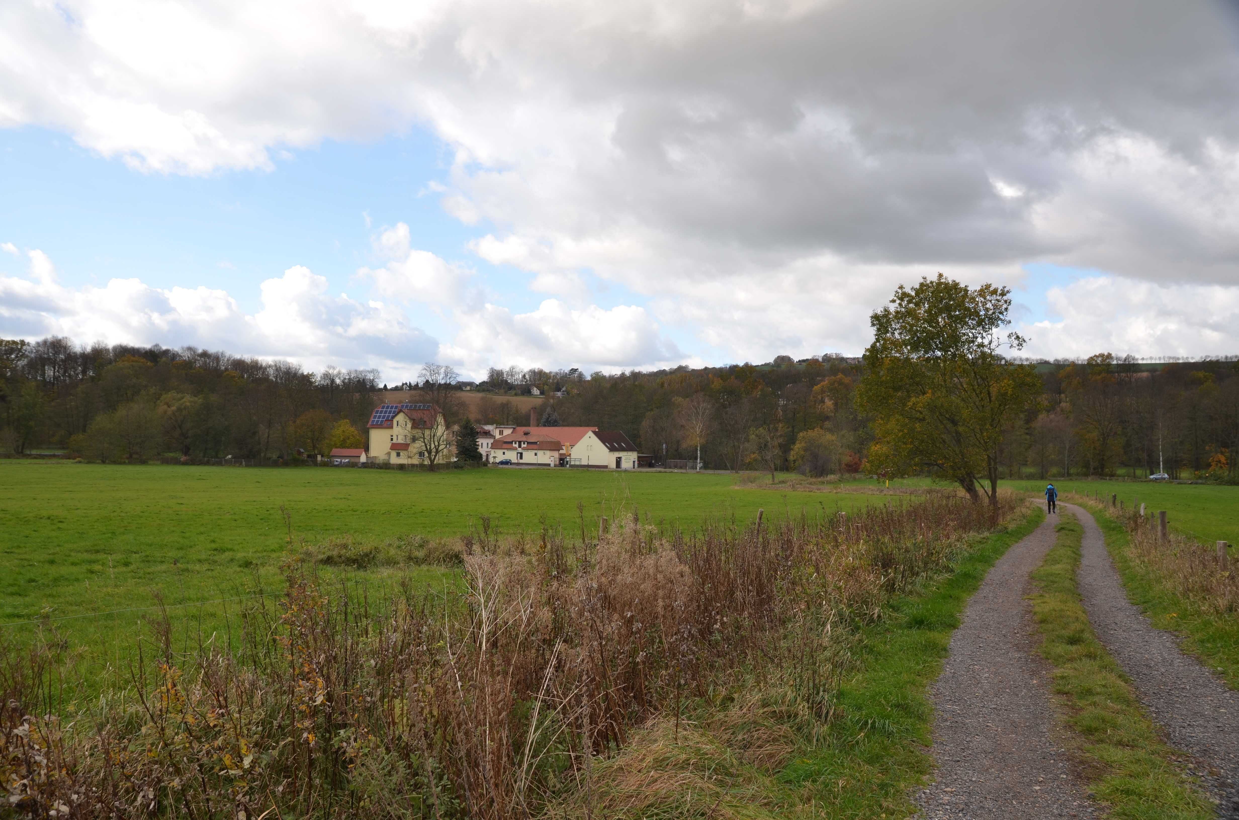 Hummelmühle